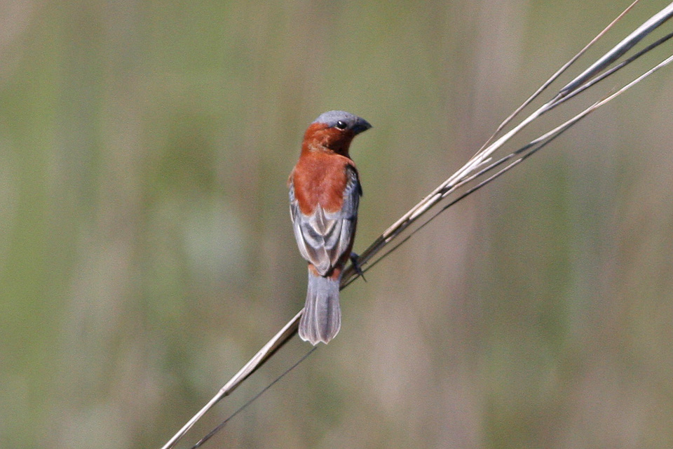 Pellegrini to A del Vache,Corrientes